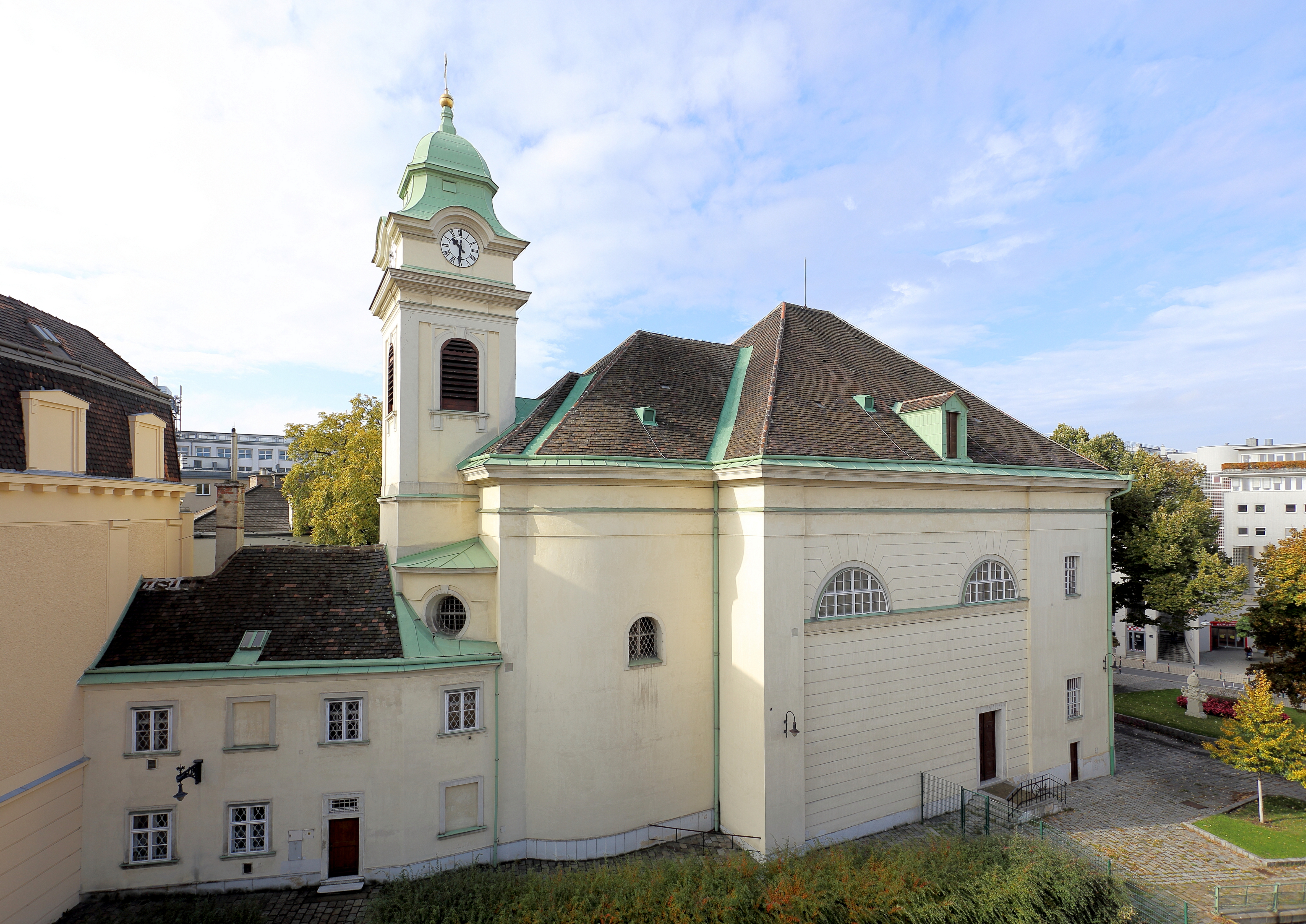 Nordostansicht (erdbergstraßenseitig) der römisch-katholischen Pfarrkirche hll. Peter und Paul in Erdberg, ein Stadtteil der österreichischen Bundeshauptstadt Wien. Ursprünglich eine Kapelle, die von 1700 bis 1723 errichtet wurde. 1770 erfolgte eine Erweiterung um einen Drei-Konchen-Chor und einen Turm. 1832/33 vergrößerte man den Sakralbau und 1850 wurden an der Südseite der Kirche drei ebenerdige Räume angebaut; darunter die der hl. Maria Magdalena geweihte Kapelle.